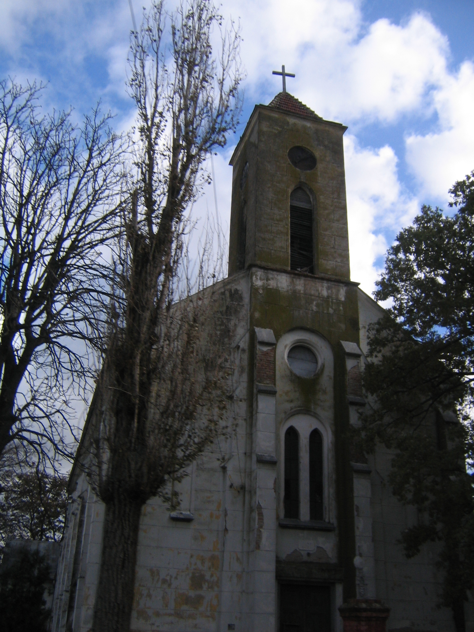 Biserica romano-catolică din Sânmihaiu German, Timiș